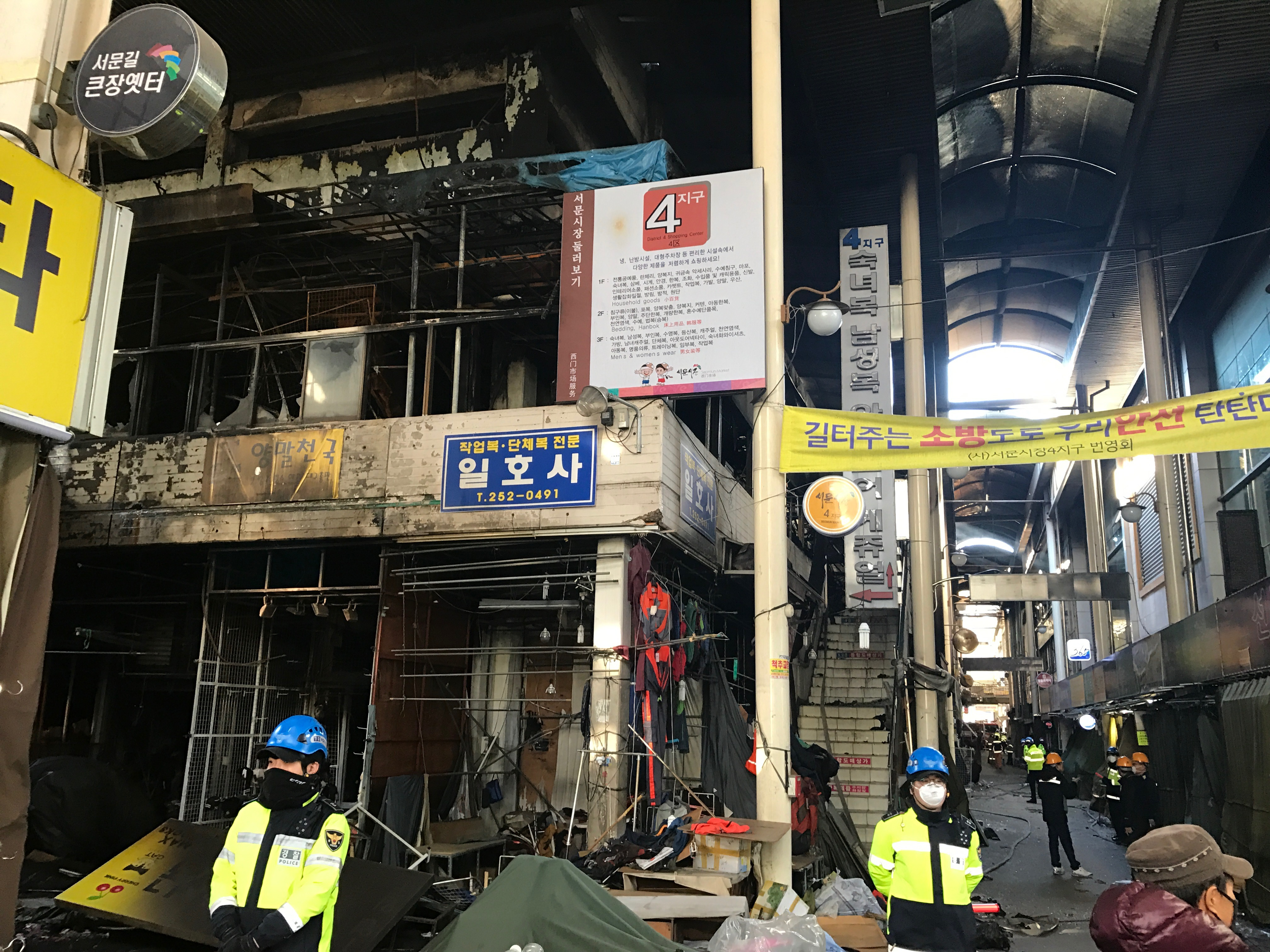 2016 대구광역시 서문 시장 화재현장 1